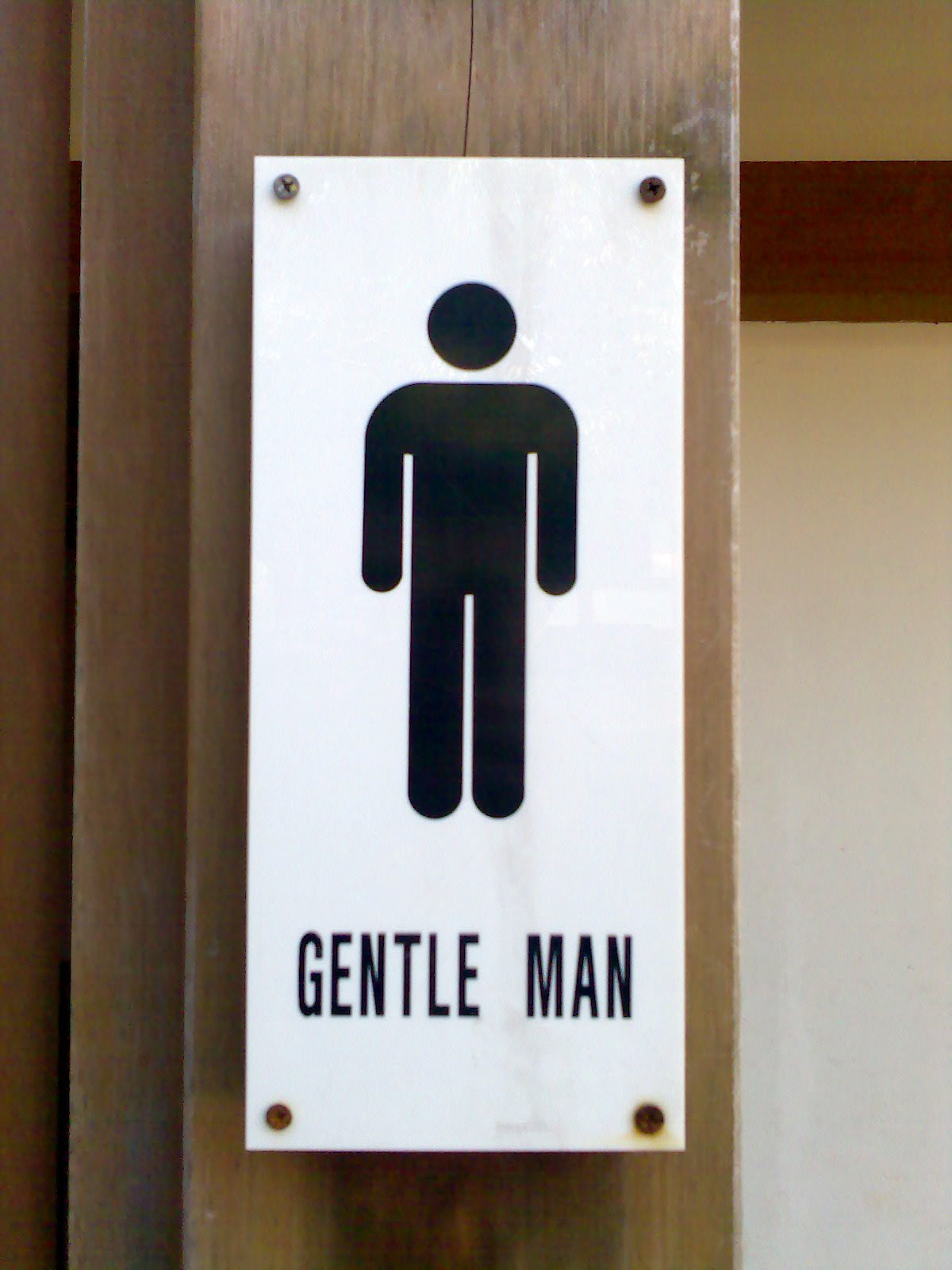 Gentle man